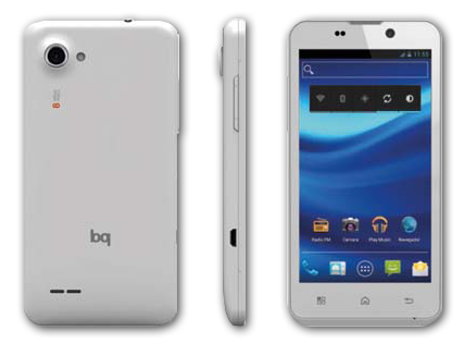 Teléfono movil de la marca BQ Readers